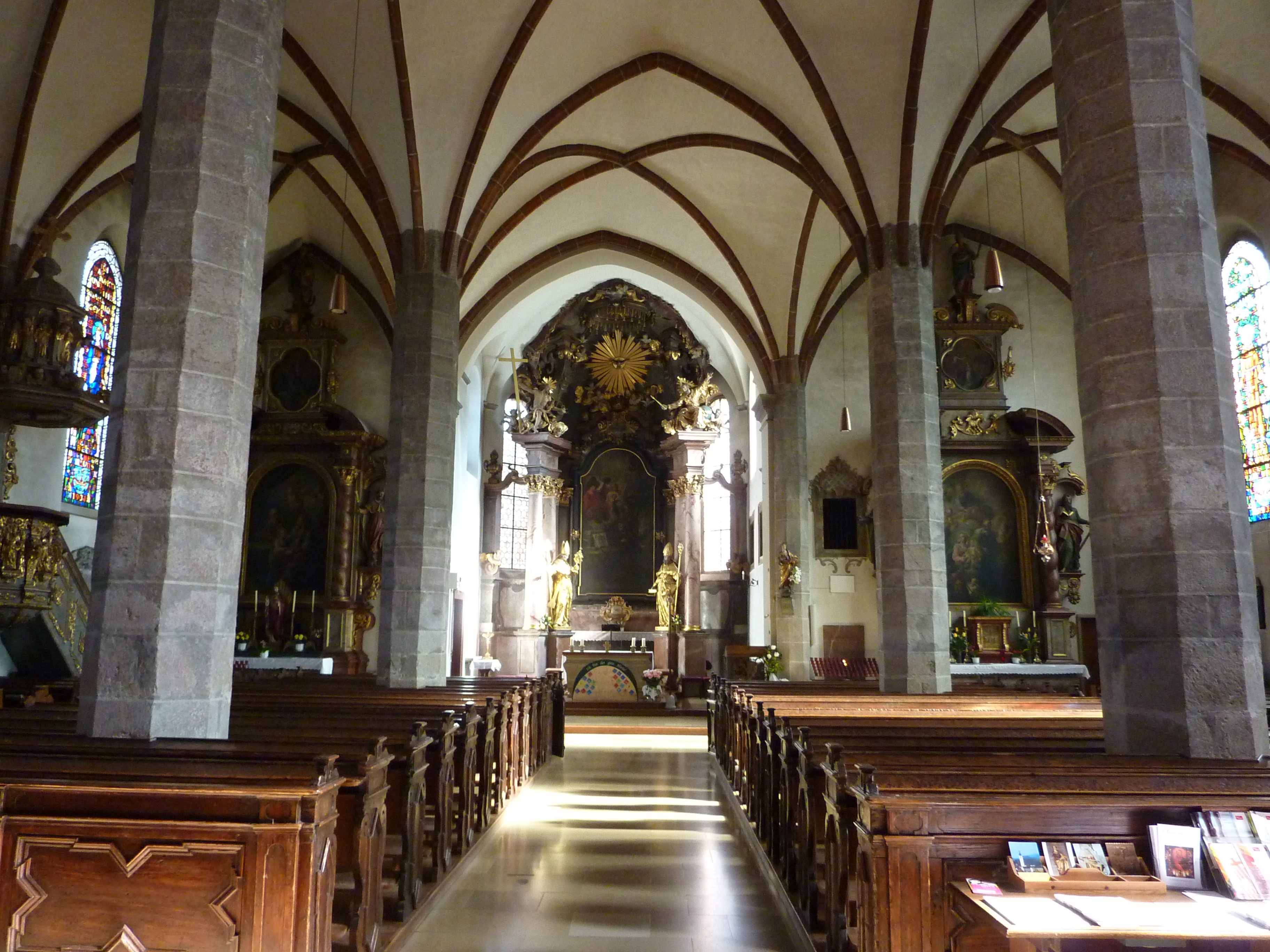 Pfarrkirche Grein, Oberösterreich